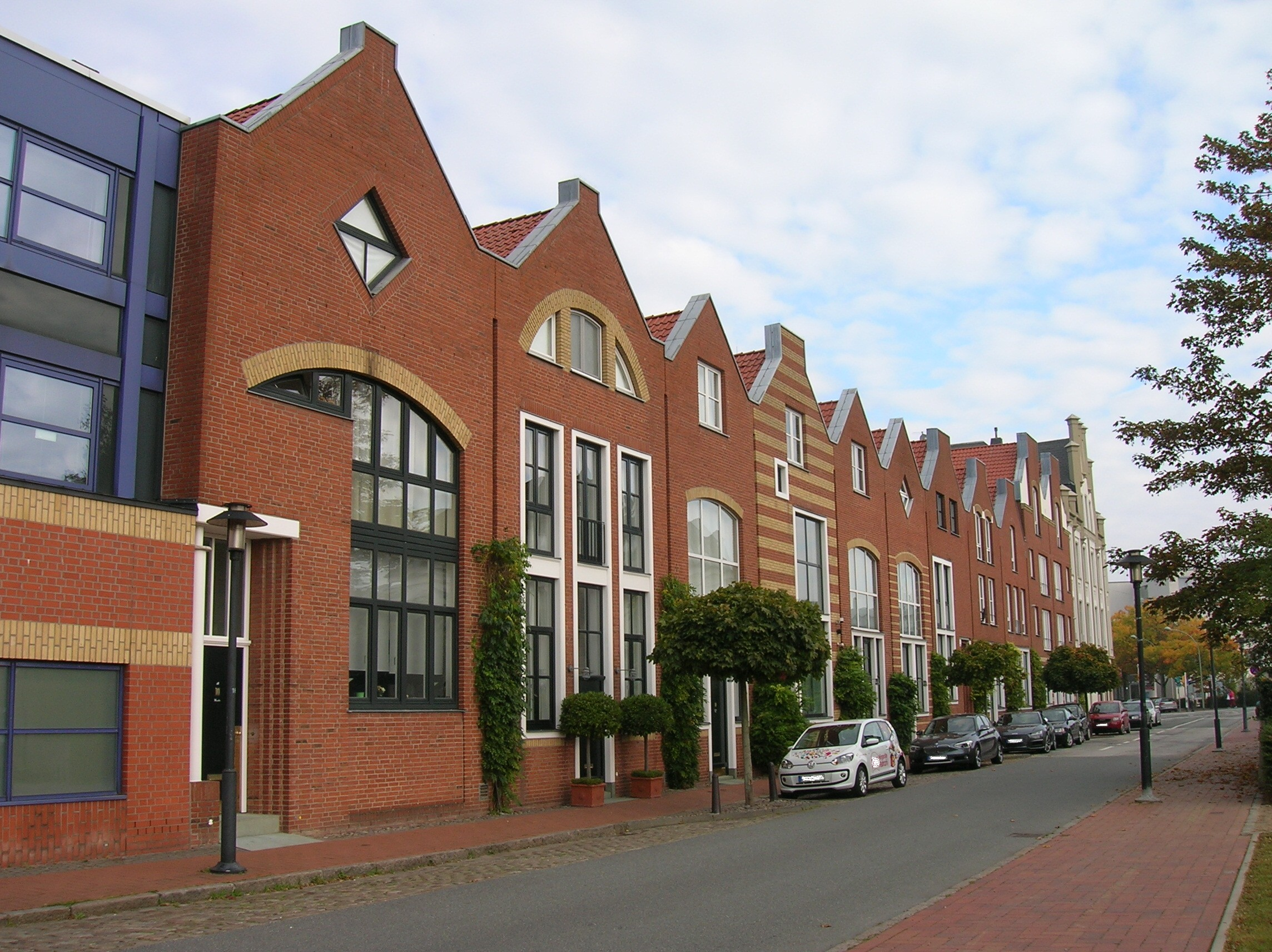 Häuser auf der Nordseite der Deichstraße in Mitte (Bremerhaven)